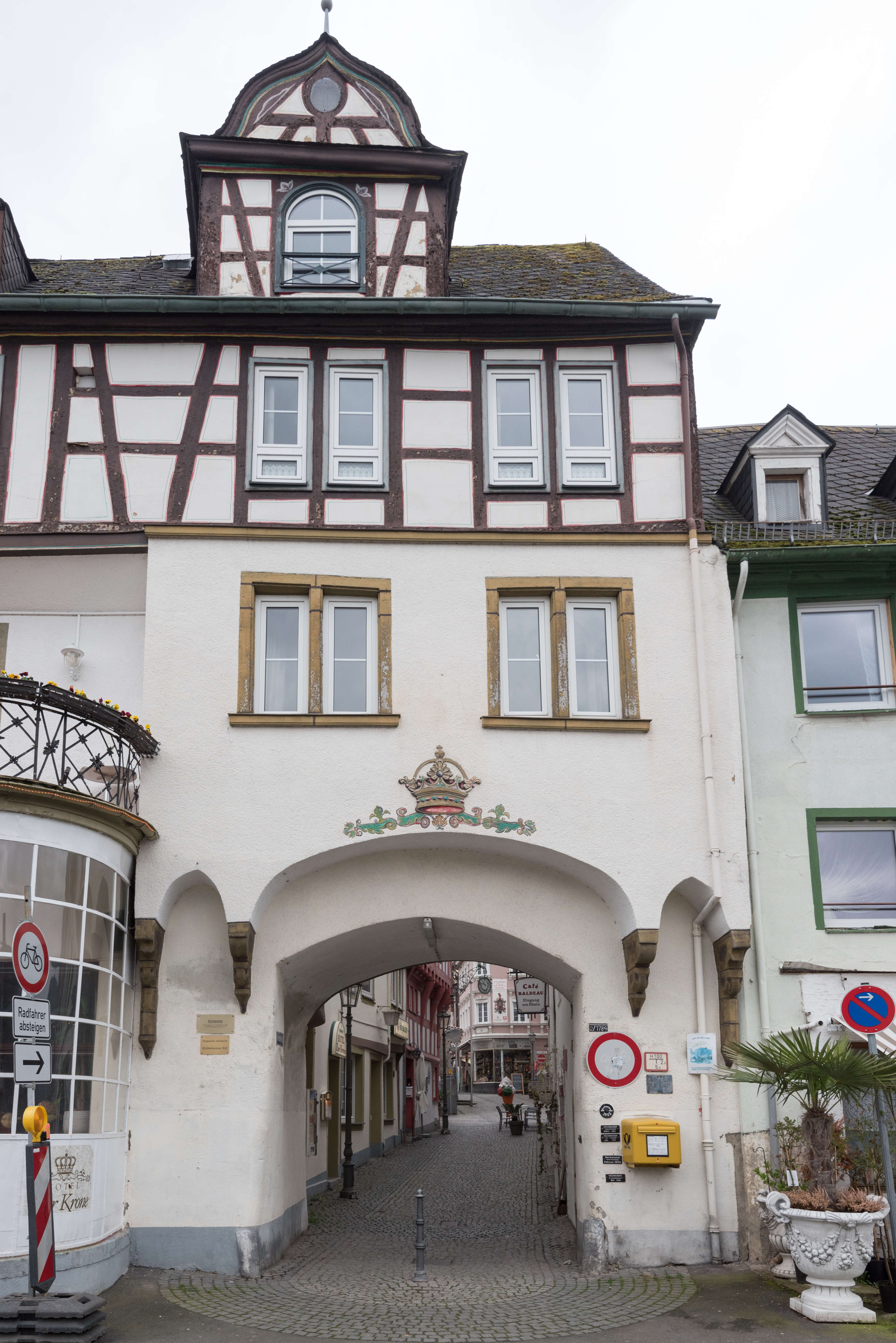 Boppard, Stadtbefestigung, Kronentor